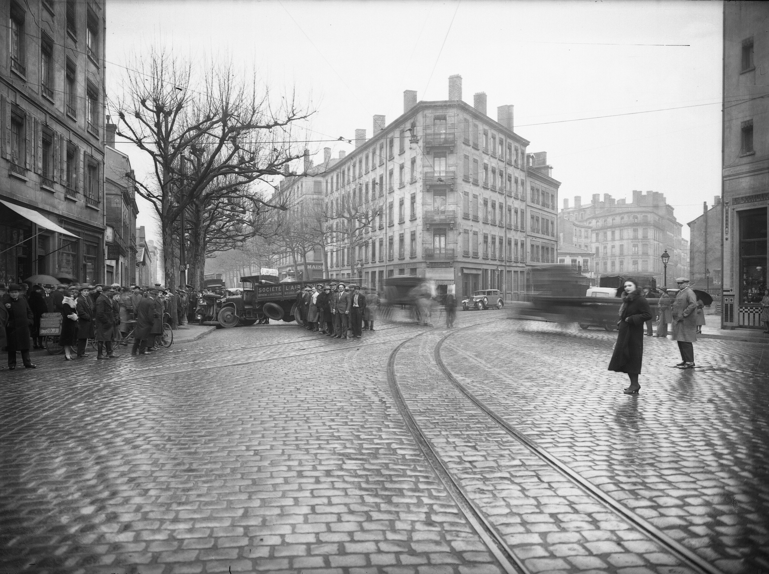 Accident sur le boulevard des Brotteaux, à Lyon.